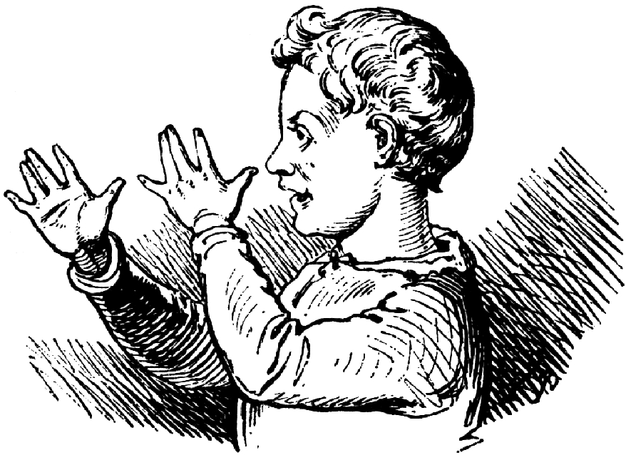 granie na nosie